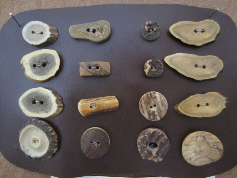 Knoflíky vyráběné z paroží zvěře